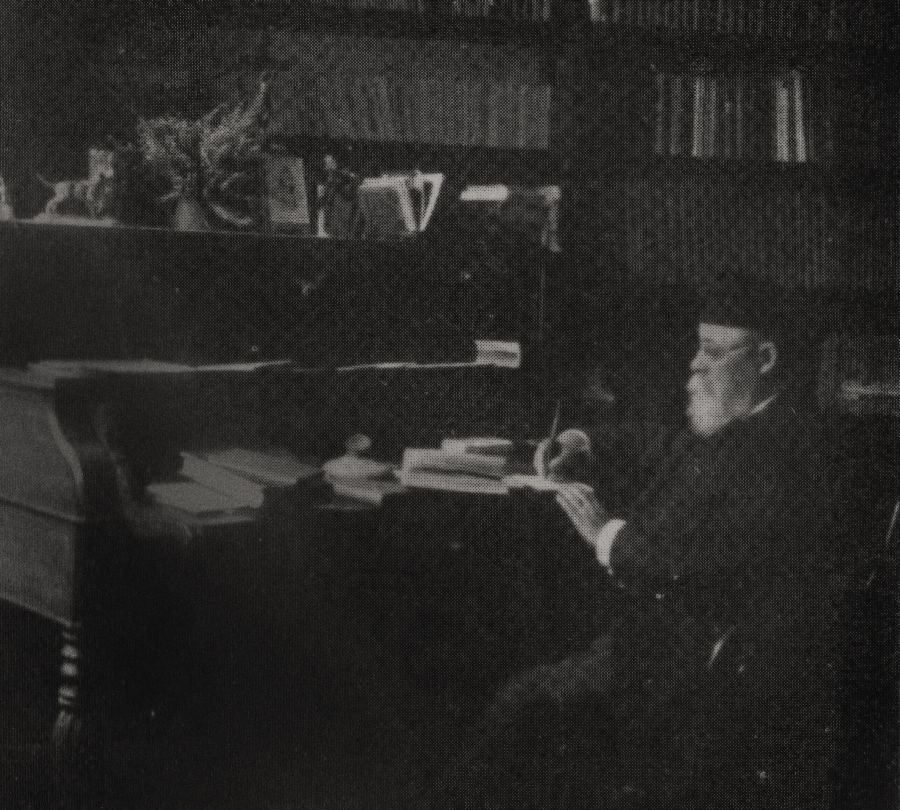 Le professeur Paul Lobstein à son bureau, septembre 1914. - illustration du livre "Un alsacien idéal"